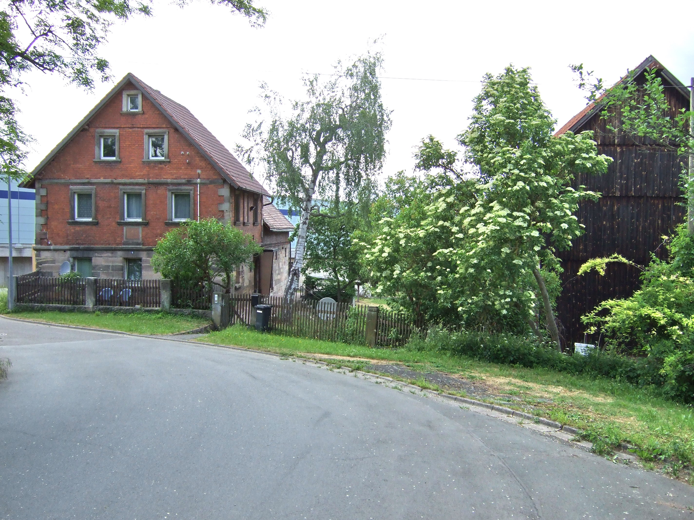 Colmdorf mit Lärmschutzwand der A9